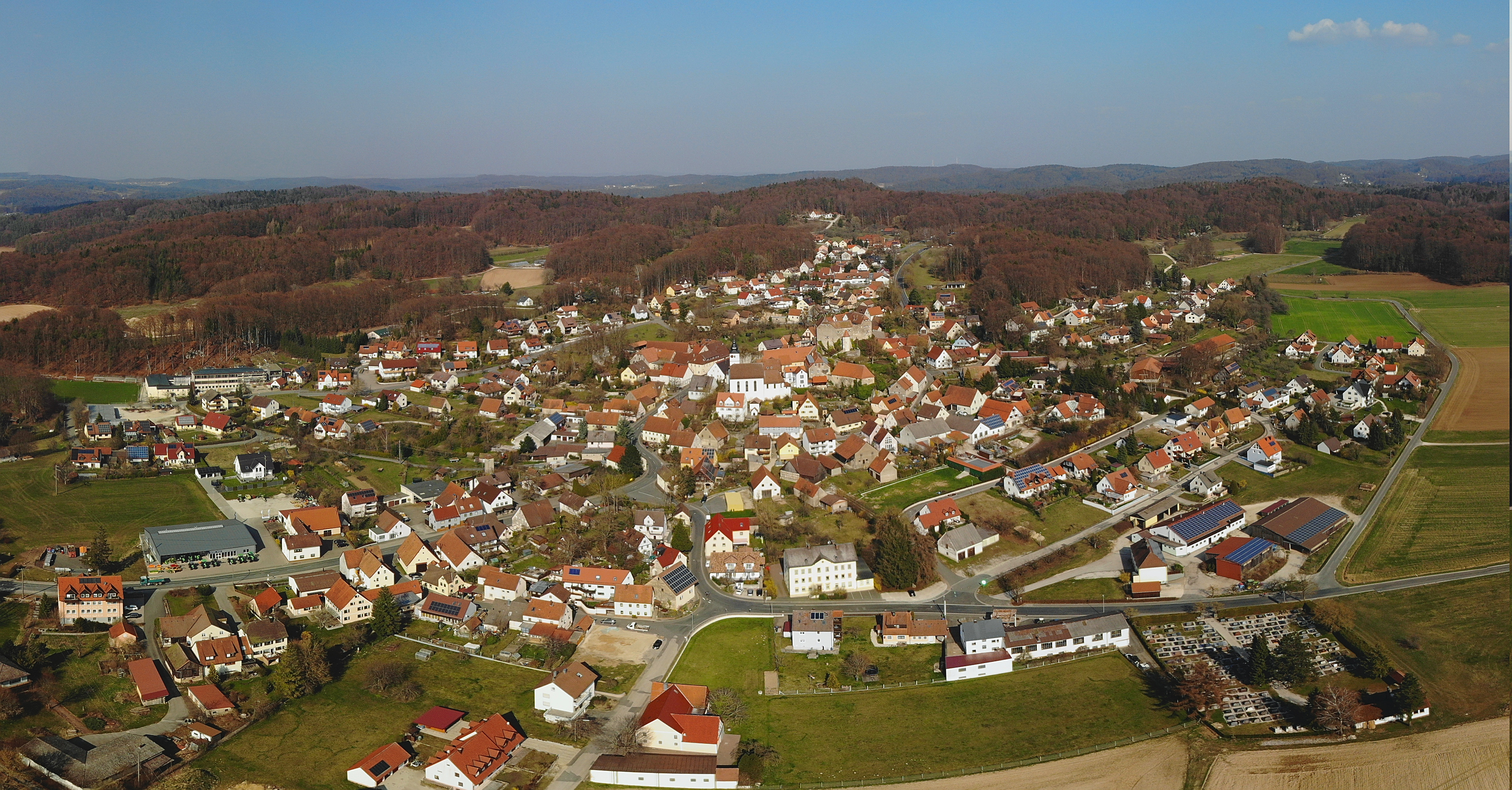 Hiltpoltstein Panorama Luftaufnahme (2020)